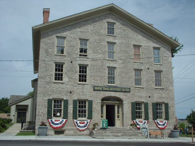 Picture 154